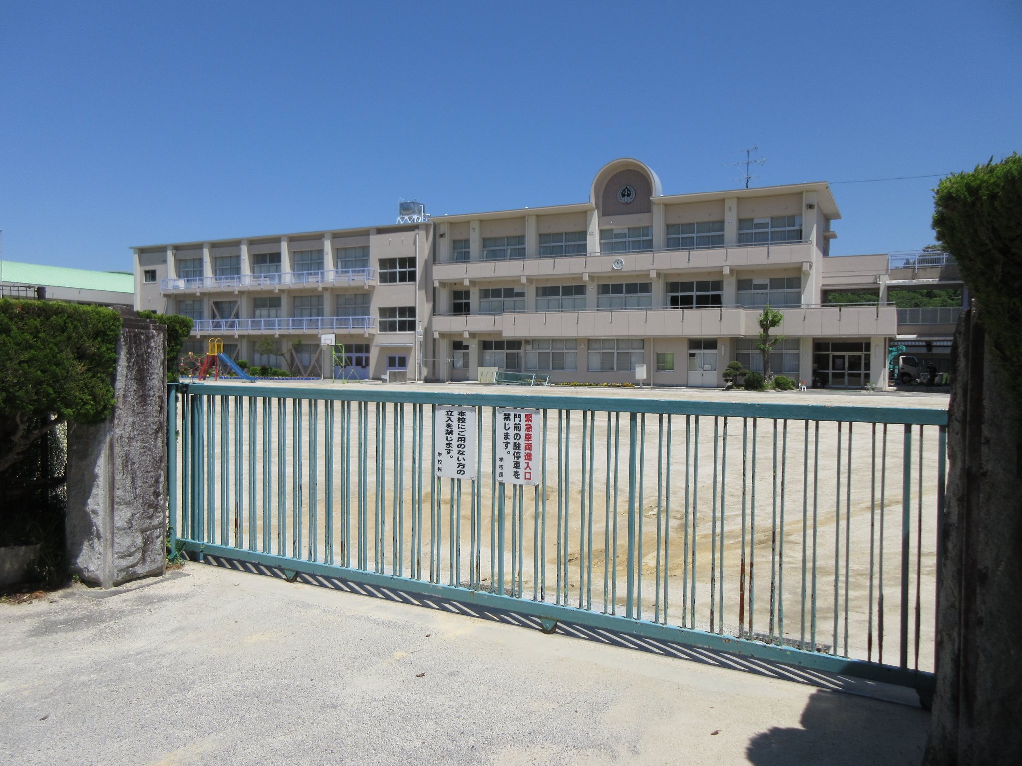 岡崎市立藤川小学校（岡崎市藤川町）